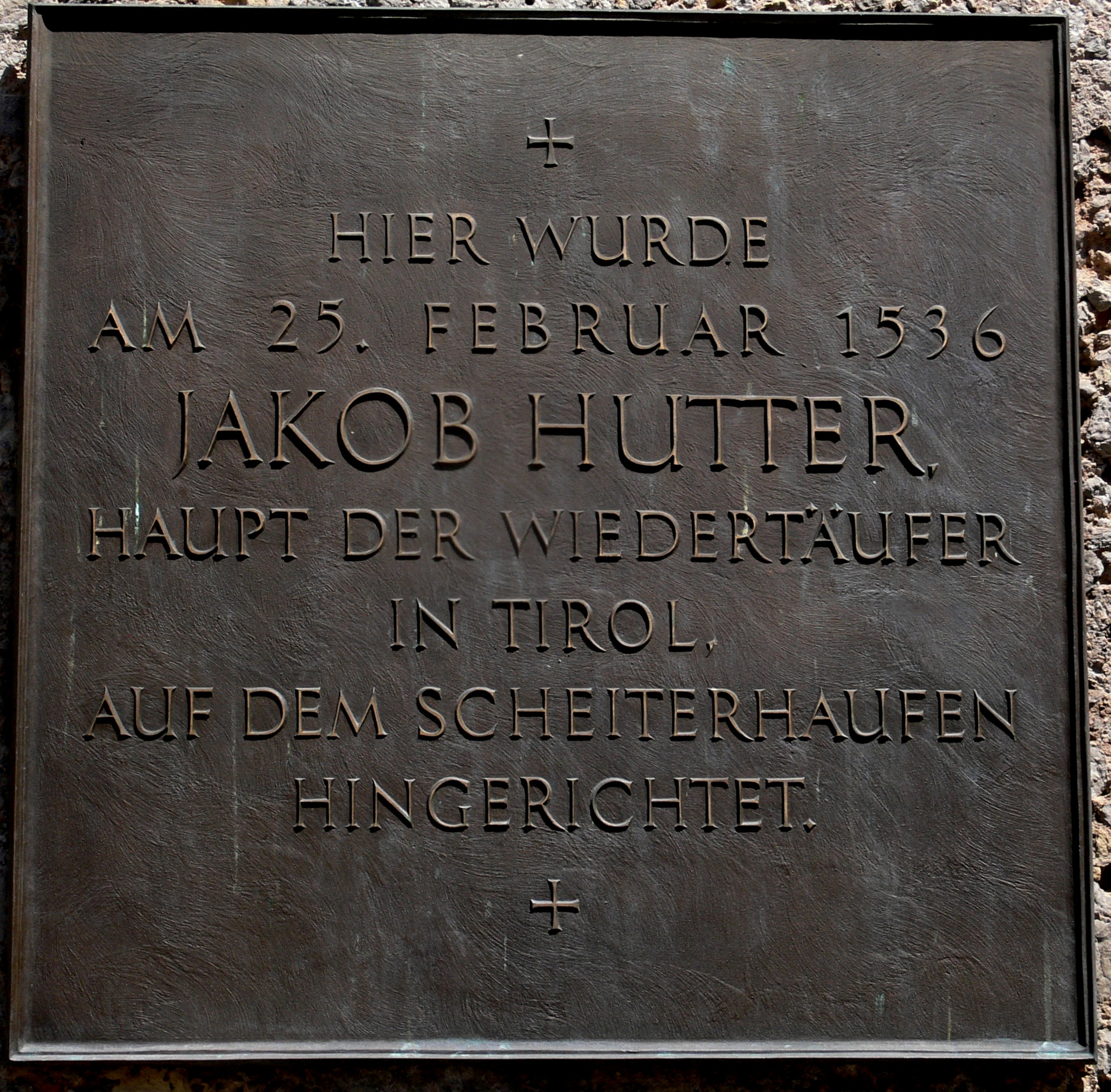 Gedenktafel für Jakob Hutter am Goldenen Dachl in Innsbruck.